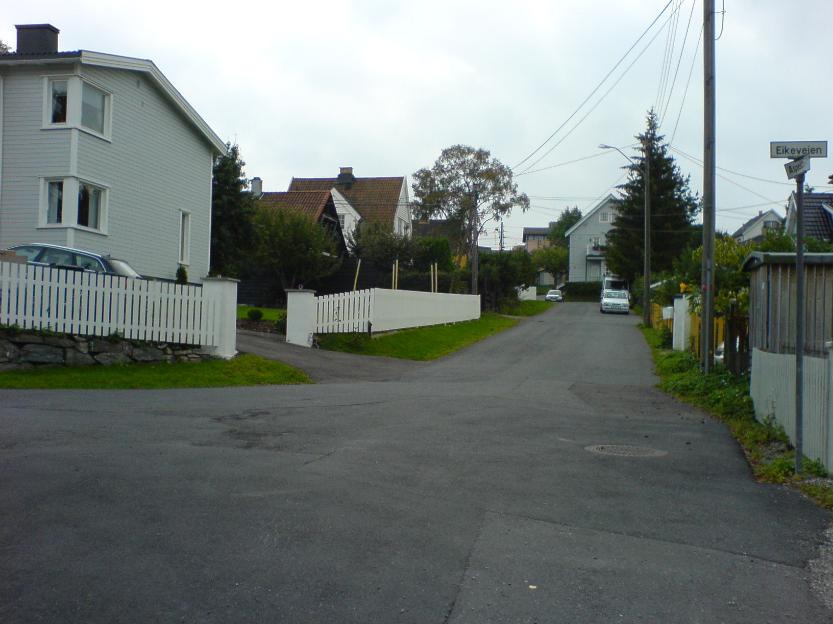 The street Eikeveien at Ekeberg in Oslo